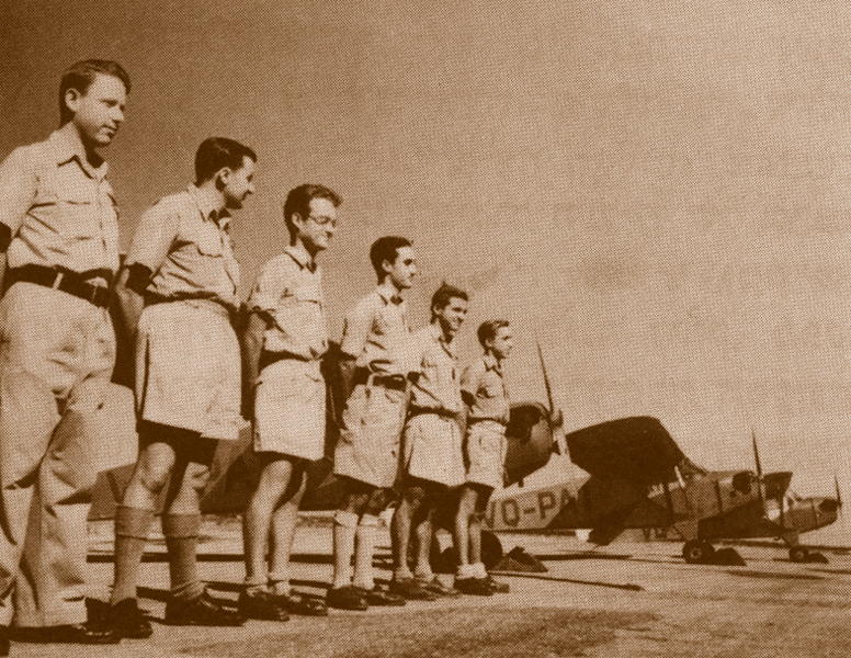 טייסי הפלמ"ח ליד מטוסי חברת אוירון שבהם התאמנו 1947 ארכיון ההגנה